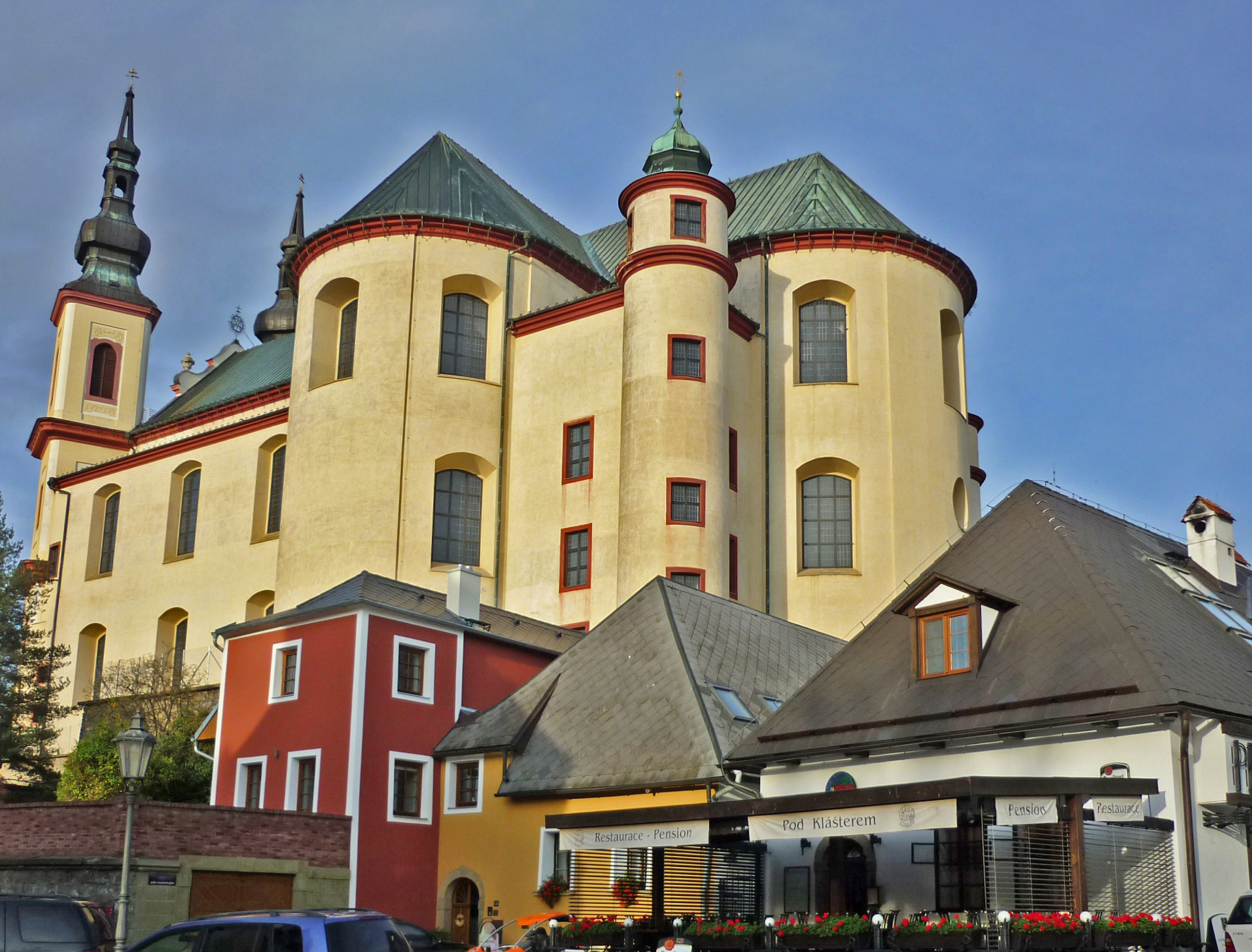 Ehemalige Piaristenkirche in Leitomischl (Litomyšl) in Böhmen